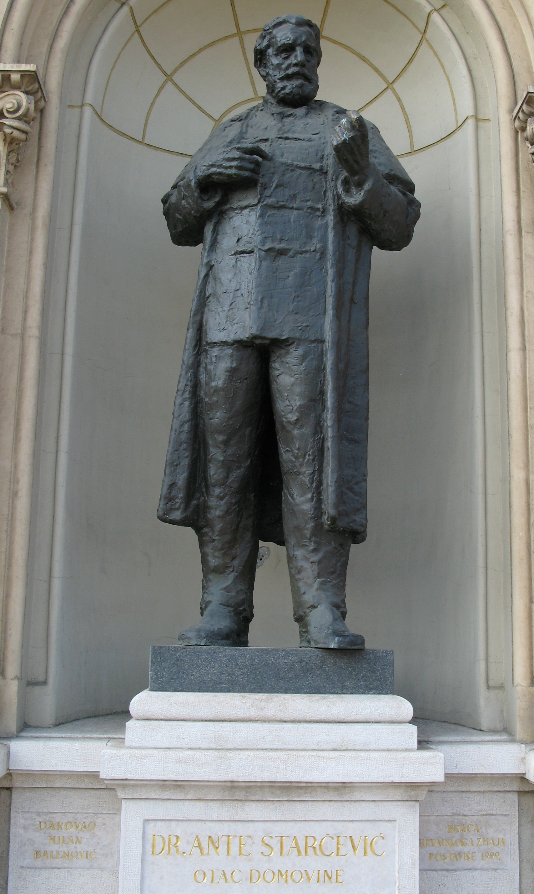 kip Ante Starčevića na Starčevićevom trgu u Zagrebu, djelo kipara Josipa Poljana